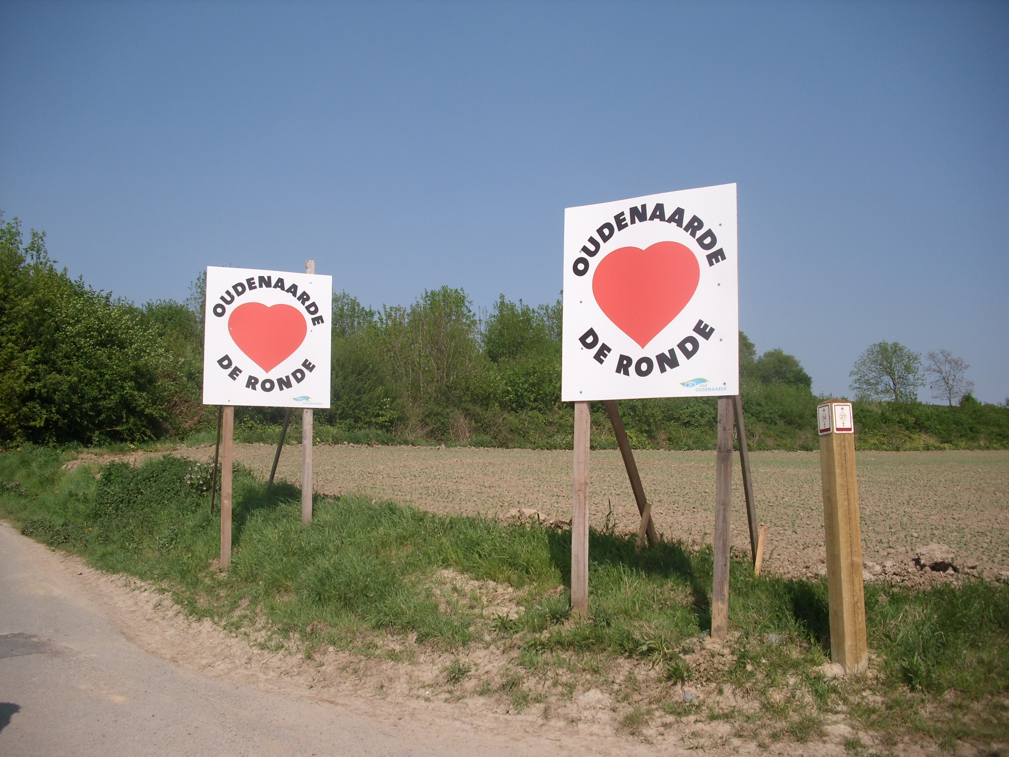 Bord Ronde van Vlaanderen - Promotie - Hoek Rotelenberg en Ten Eede - Oudenaarde - Oost-Vlaanderen - België